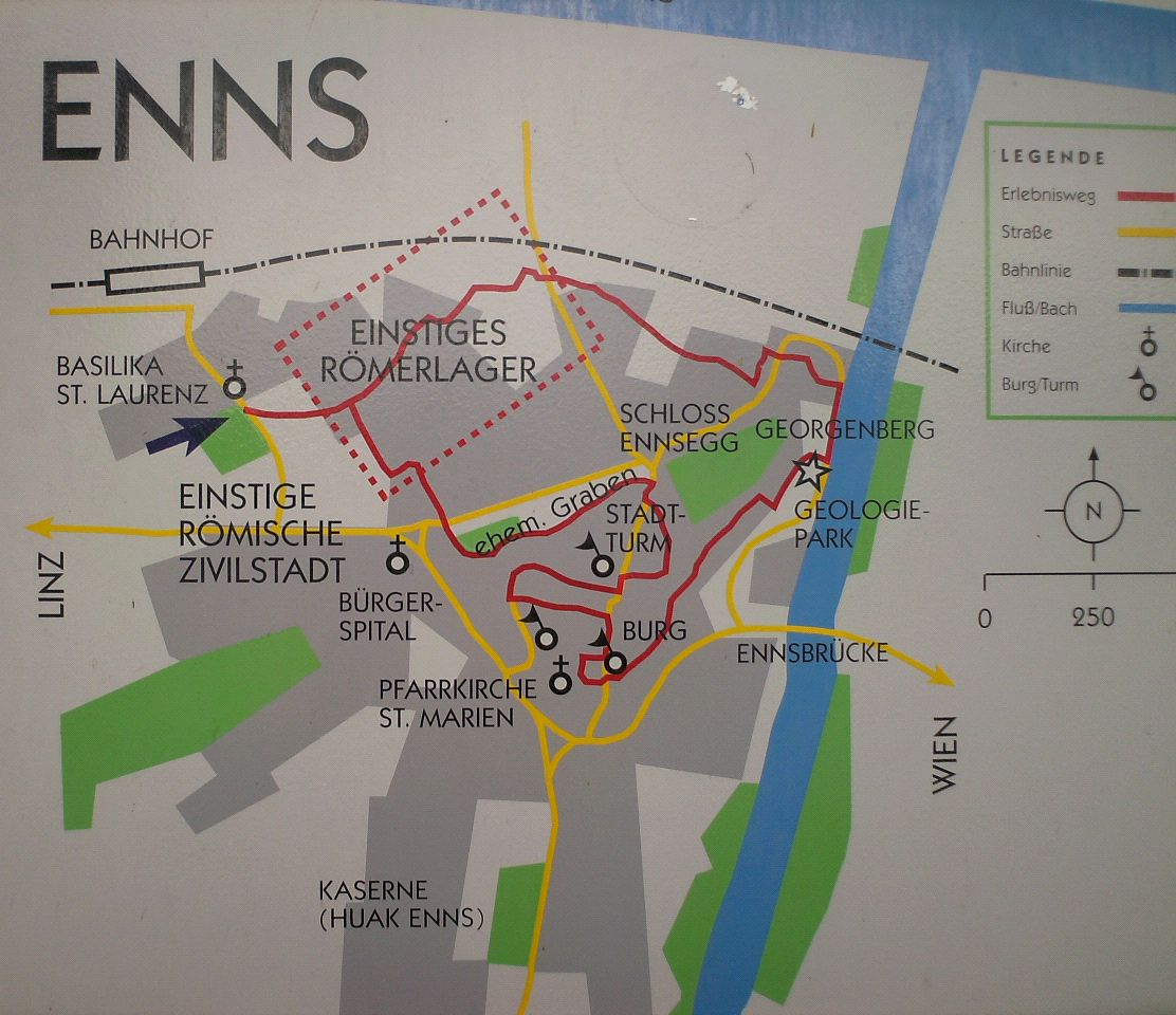 Lage des LL Lauriacum und der Zivilstadt unter dem heutigen Enns